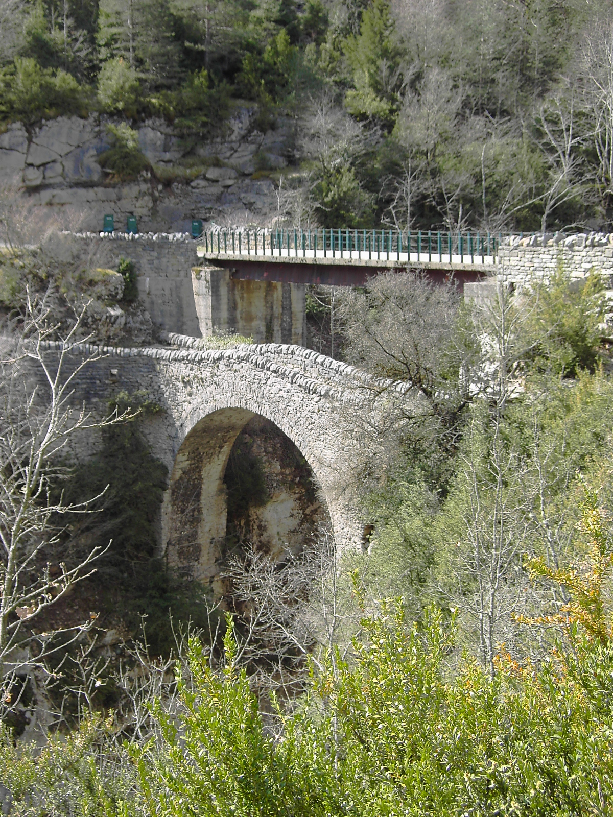 El puente románico de San Urbez, o de San Urbicio en castellano, sobre cuya construcción existe una llamativa leyenda, se alza sobre una hoz del río Vellos a una veintena de metros sobre el nivel del río en un tramo donde éste discurre completamente encajonado entre farallones calcáreos enmarcado todo ello en el espectacular Desfiladero del Vellos (o Congosto d'as Cambras en lengua aragonesa). Para eximir al viejo puente de la carga de todos aquellos peatones que visitan esta zona del Parque Nacional de Ordesa y Monte Perdido, la administración ha construido el segundo puente de la imagen.